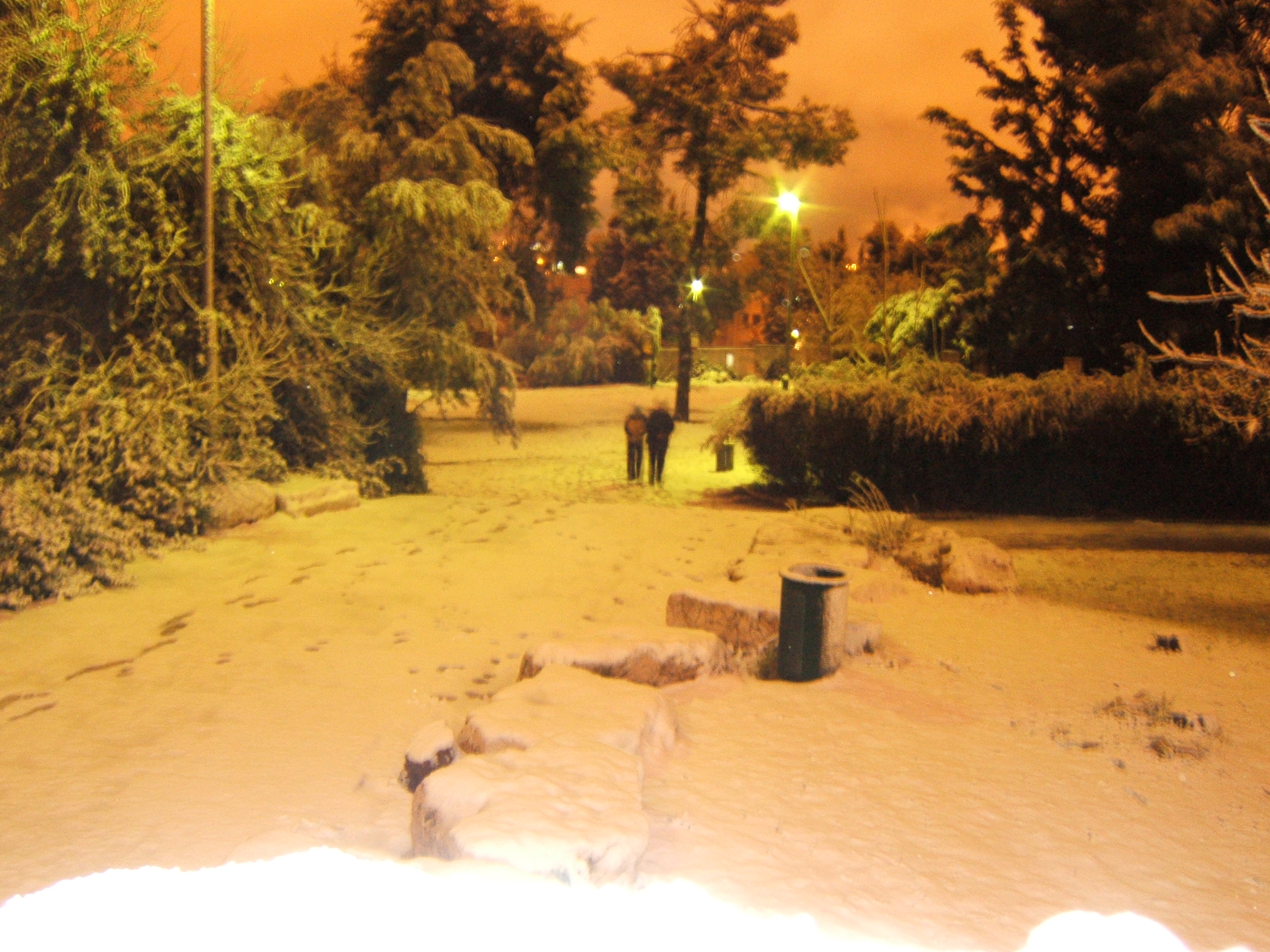 Jerusalén bajo un manto de nieve, tres años después de la última nevada. 27 de diciembre de 2007. Barrio Katamón Viejo (שכונת קטמון הישנה), Parque San Simón (פארק סן סימון).